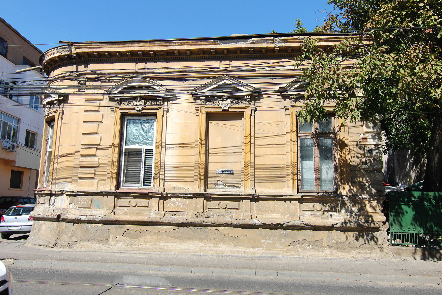 Casă pe Calea Călărașilor